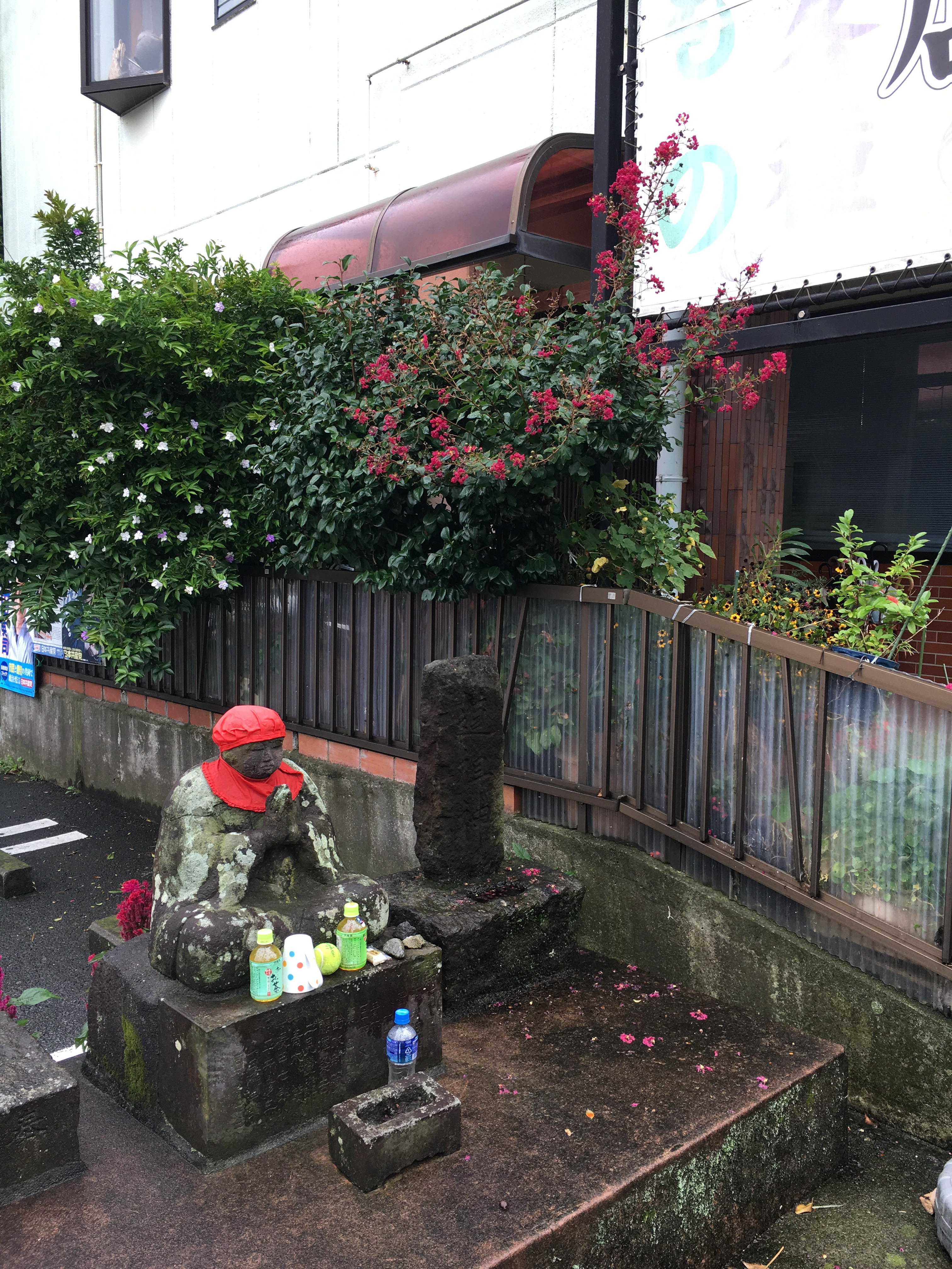 丸山の道祖神